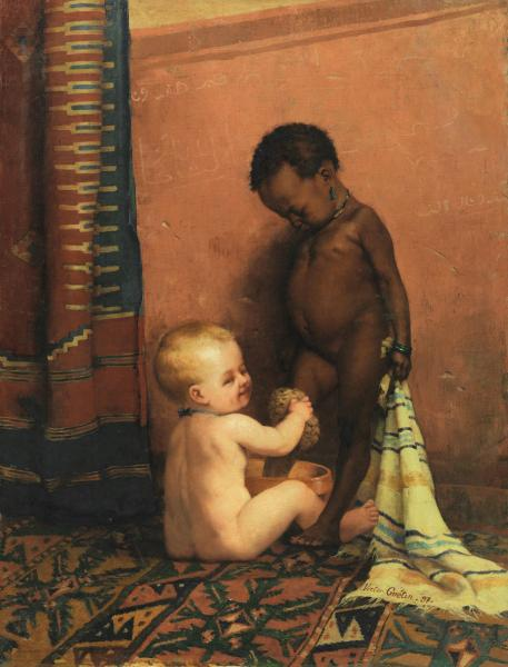 Deux enfants